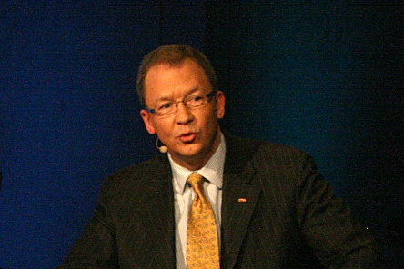 Idar Kreutzer, Storebrand-leder. Fra NHOs Årskonferanse 2009.